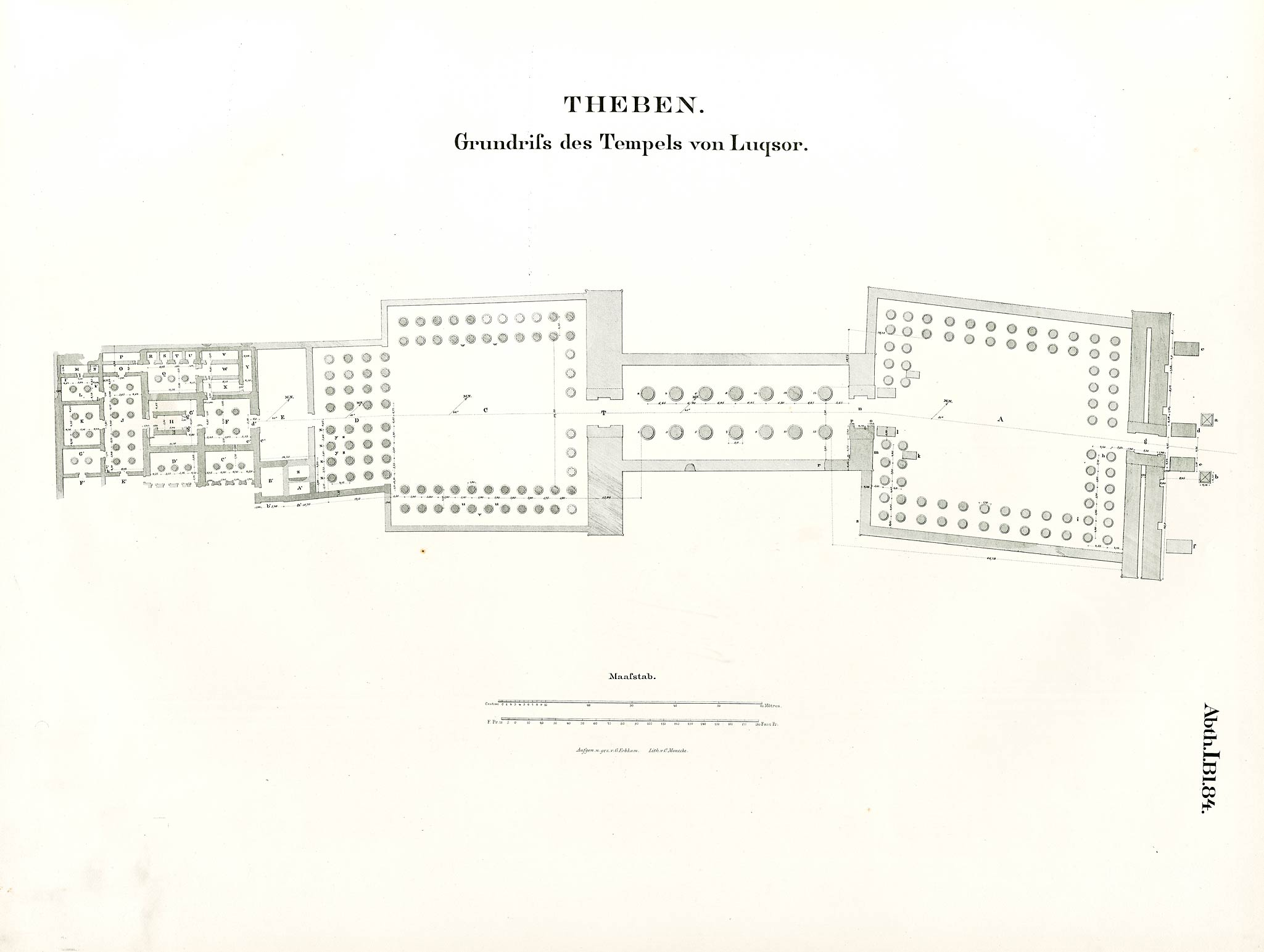 Denkmaeler aus Aegypten und Aethiopien nach den Zeichnungen der von Seiner Majestät dem Koenige von Preussen, Friedrich Wilhelm IV., nach diesen Ländern gesendeten, und in den Jahren 1842–1845 ausgeführten wissenschaftlichen Expedition auf Befehl Seiner Majestät